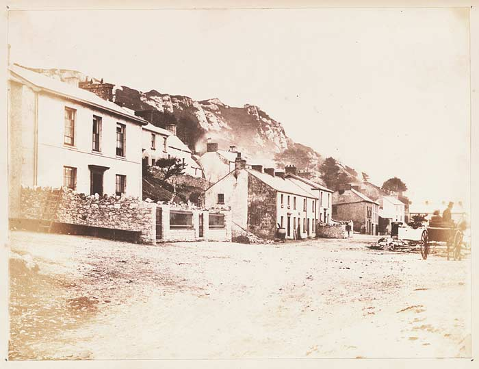 Teitl Cymraeg/Welsh title: Ystumllynarth Ffotograffydd/Photographer: Mary Dillwyn (1816-1906) Dyddiad/Date: c. 1853-4 Cyfeiriad/Reference: viv00082 (pb02376/46) Rhif cofnod / Record no.: 3590001 Rhagor o wybodaeth am Ffotograffiaeth Gynnar Abertawe yn Llyfrgell Genedlaethol Cymru More information about Early Swansea Photography at the National Library of Wales